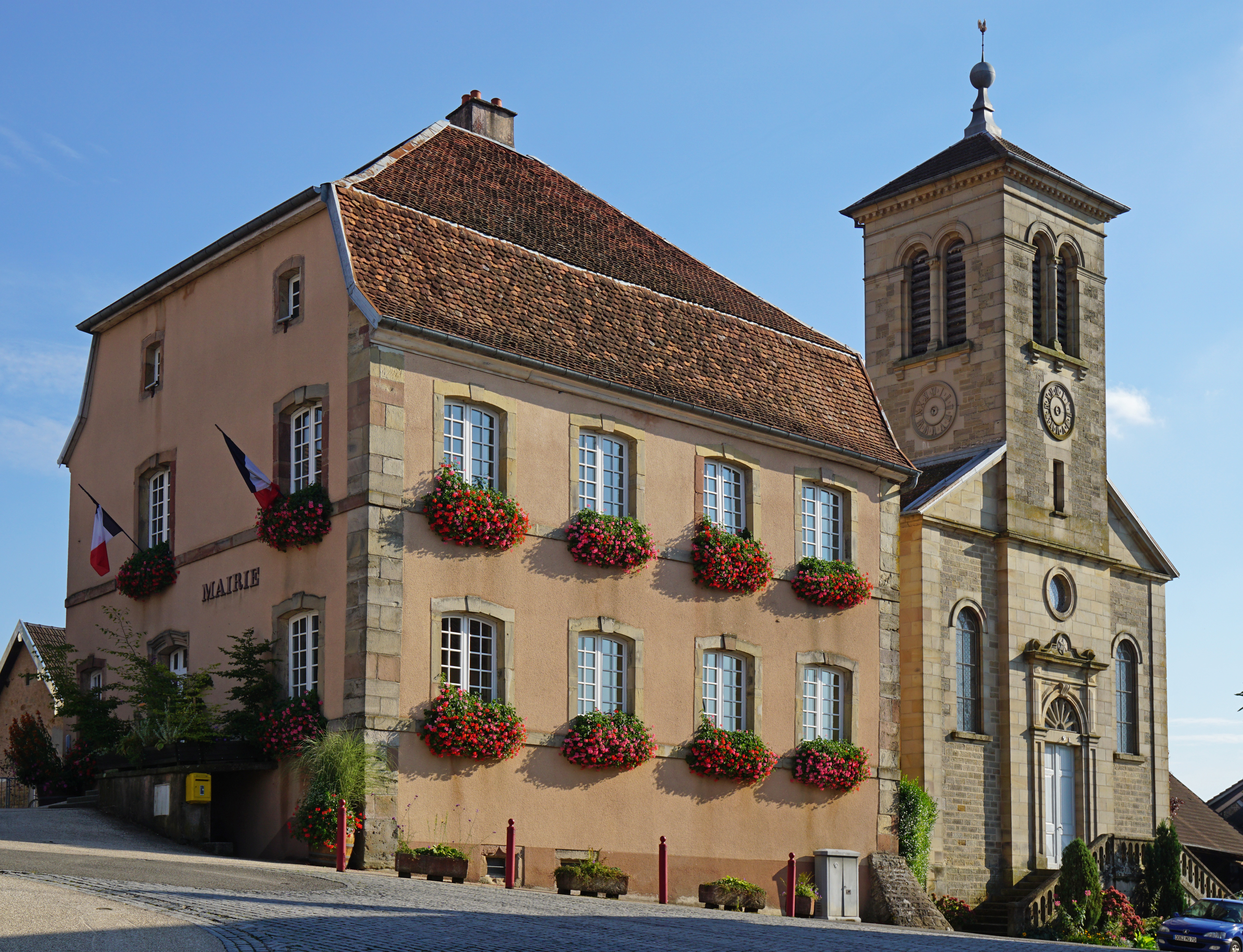 Le temple et la mairie de Luze.